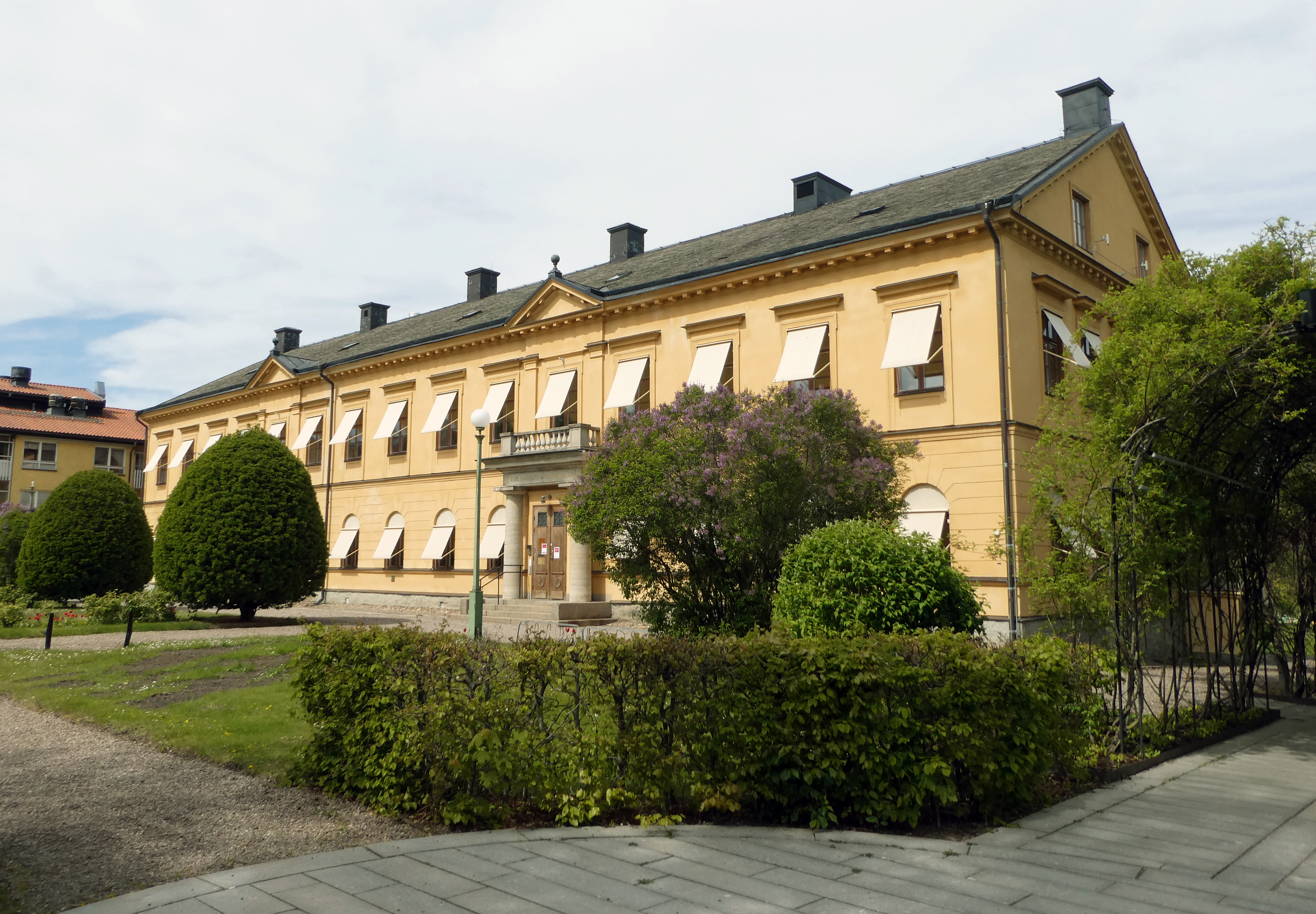 Konsistoriehuset i Linköping snett framifrån